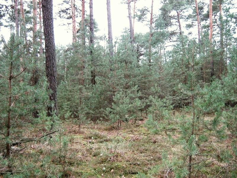 Kiefernnaturverjüngung auf armen Standorten in den Krausnicker Bergen (Landkreis Dahme-Spreewald, Brandenburg).